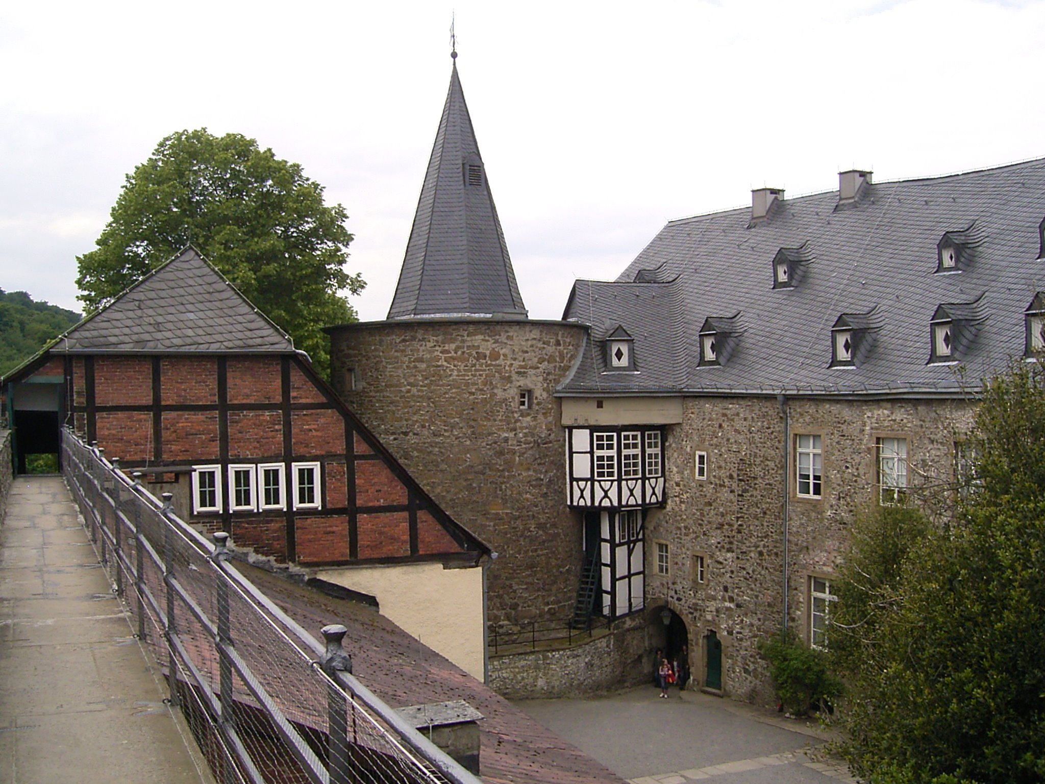 Deutsches Kaltwalzmuseum im Schloss Hohenlimburg in Hagen-Hohenlimburg